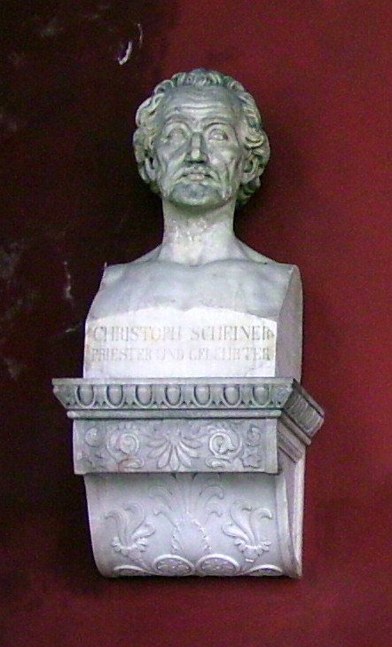 Bust of Christoph Scheiner at Ruhmeshalle ("Hall of fame"), München, Germany. Picture taken by myself: Dominik Hundhammer, München, 27 March 2006.